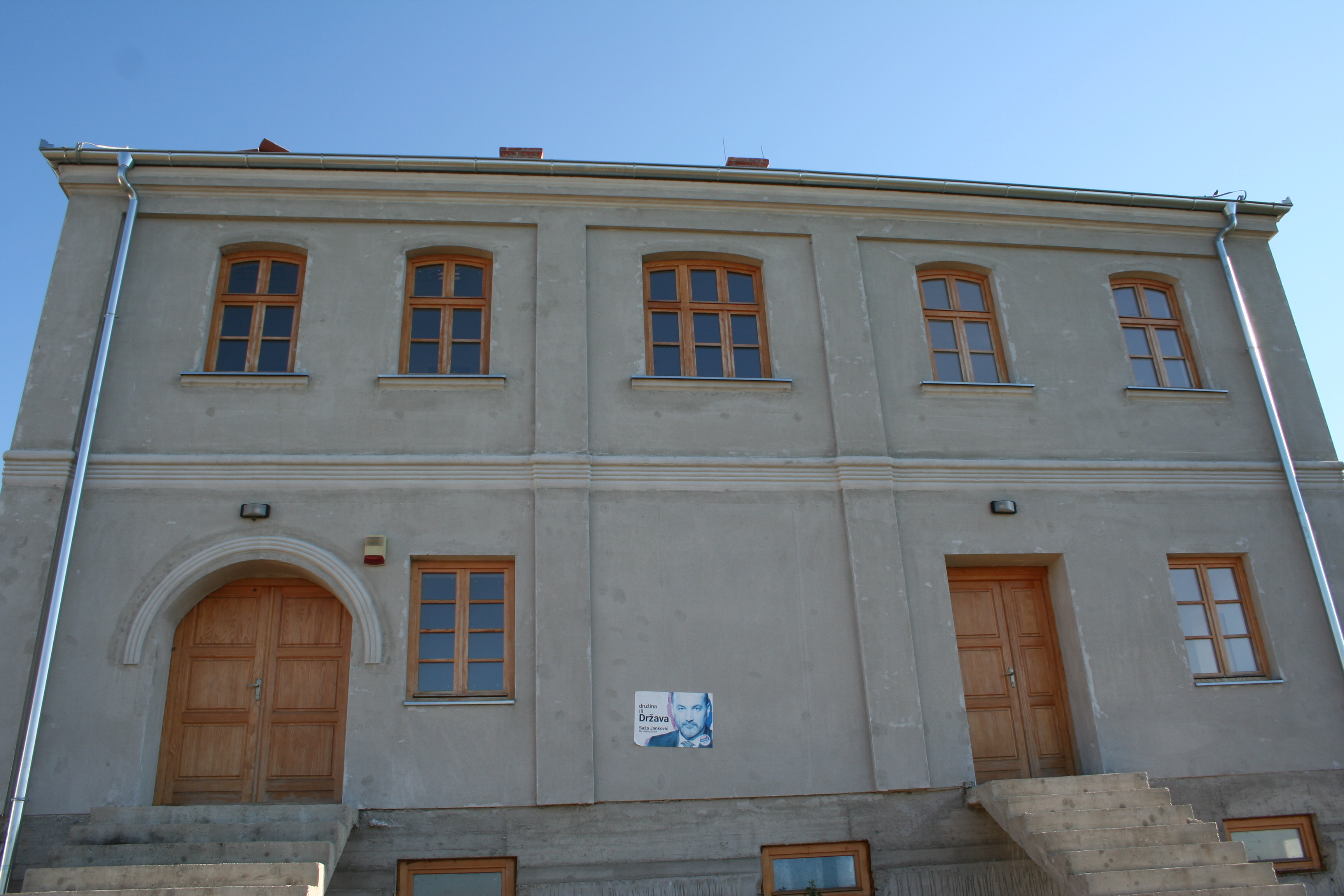 Konaci Radića i Brene Mihajlović (preseljeni iz Malog Borka u Lajkovac)